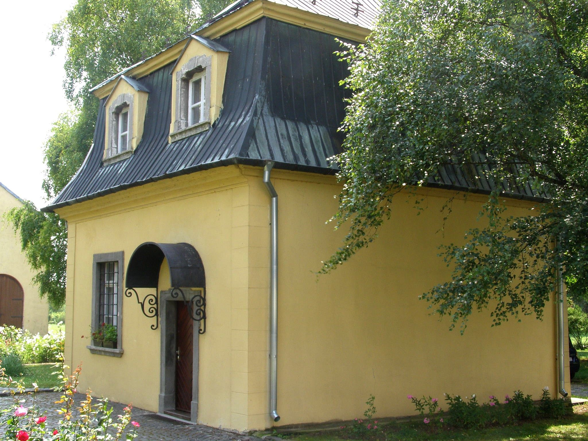 Hudobný pavilón - barokový domček spojený s pobytom L. van Beethovena v kaštieli